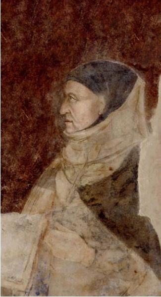 Giovanni Boccaccio/ Giovanni Boccaccio, la piu' antica rappresentazione esistente (sec. XIV)